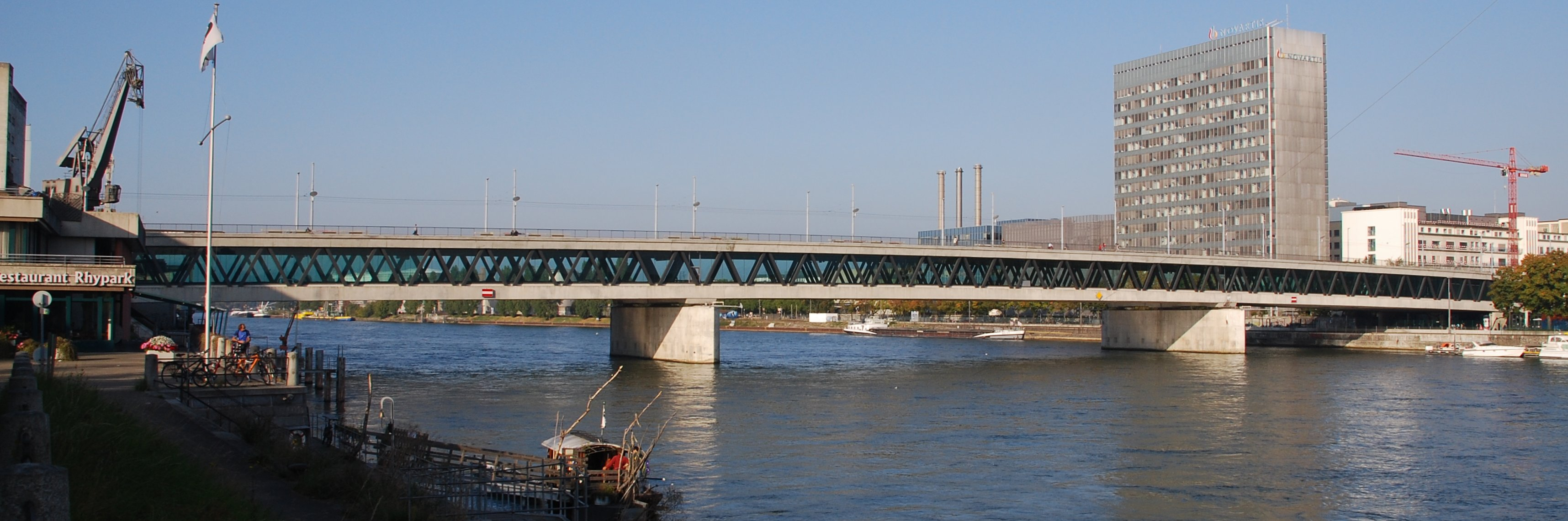 Dreirosenbrücke in Basel, im Vordergrund die St. Johanns-Fähre